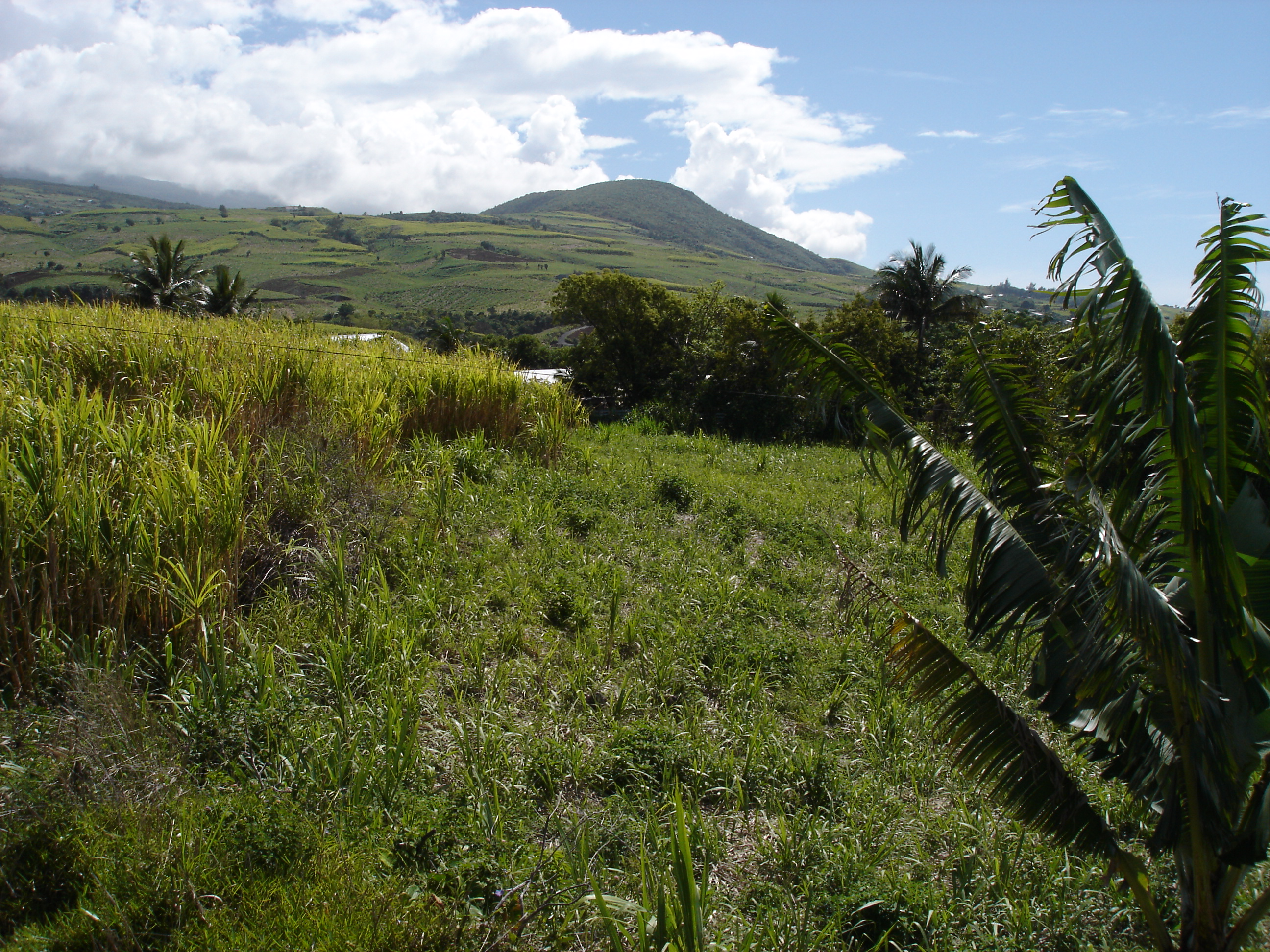 Description: Champs de cannes à sucre dans les Hauts de Saint-Joseph, novembre 2004, La Réunion Source: Bouba